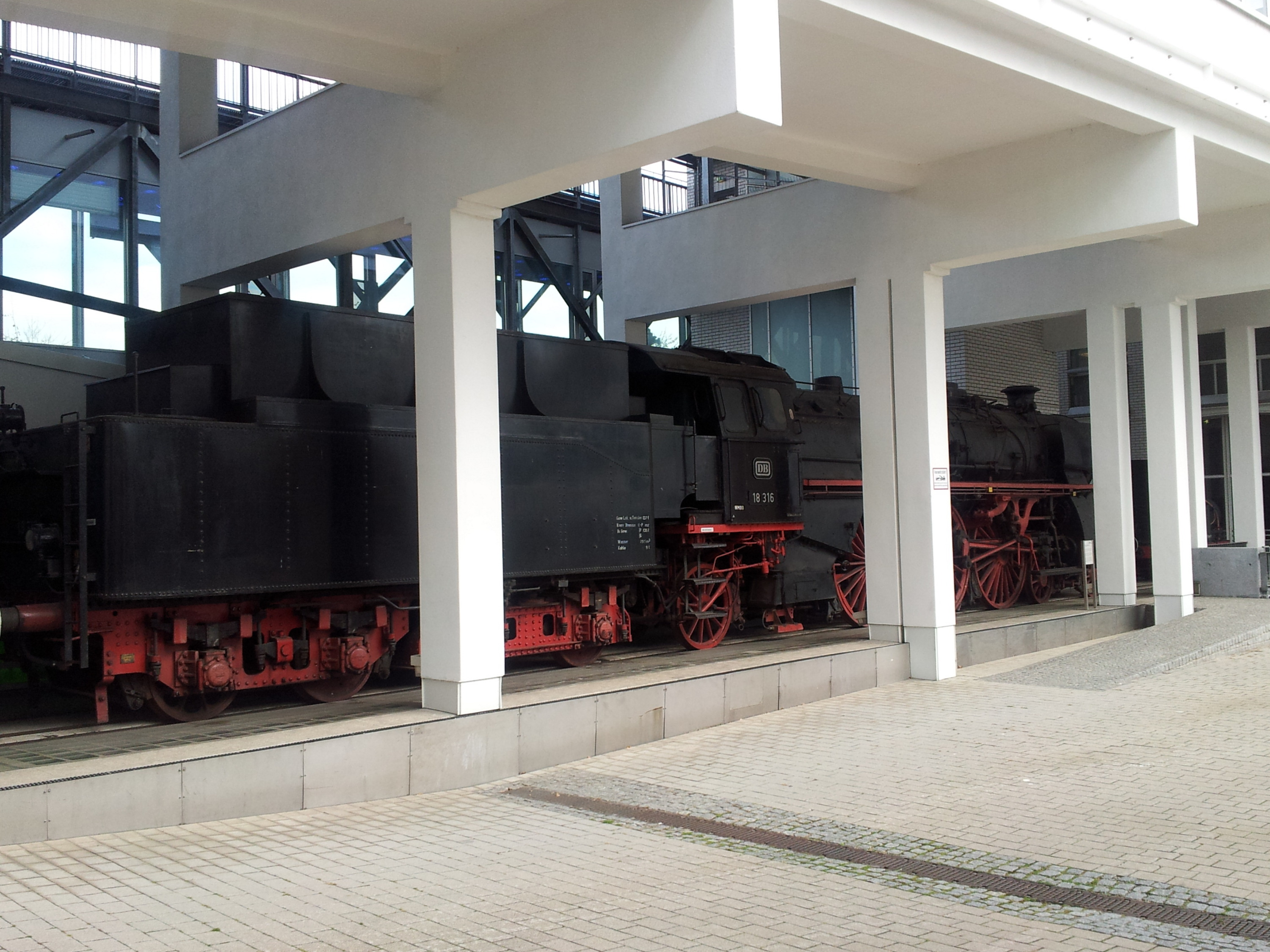 Die Badische IV h Baureihe 18 316 im Technoseum Mannheim. Ehemalige Schnellzuglokomotive auf der Rheintalstrecke Basel - Mannheim